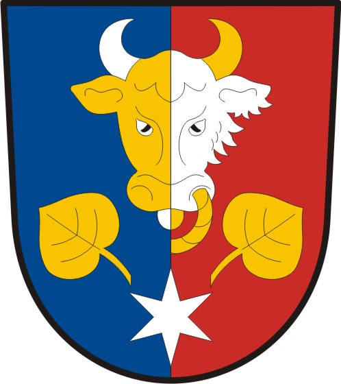 Býkev